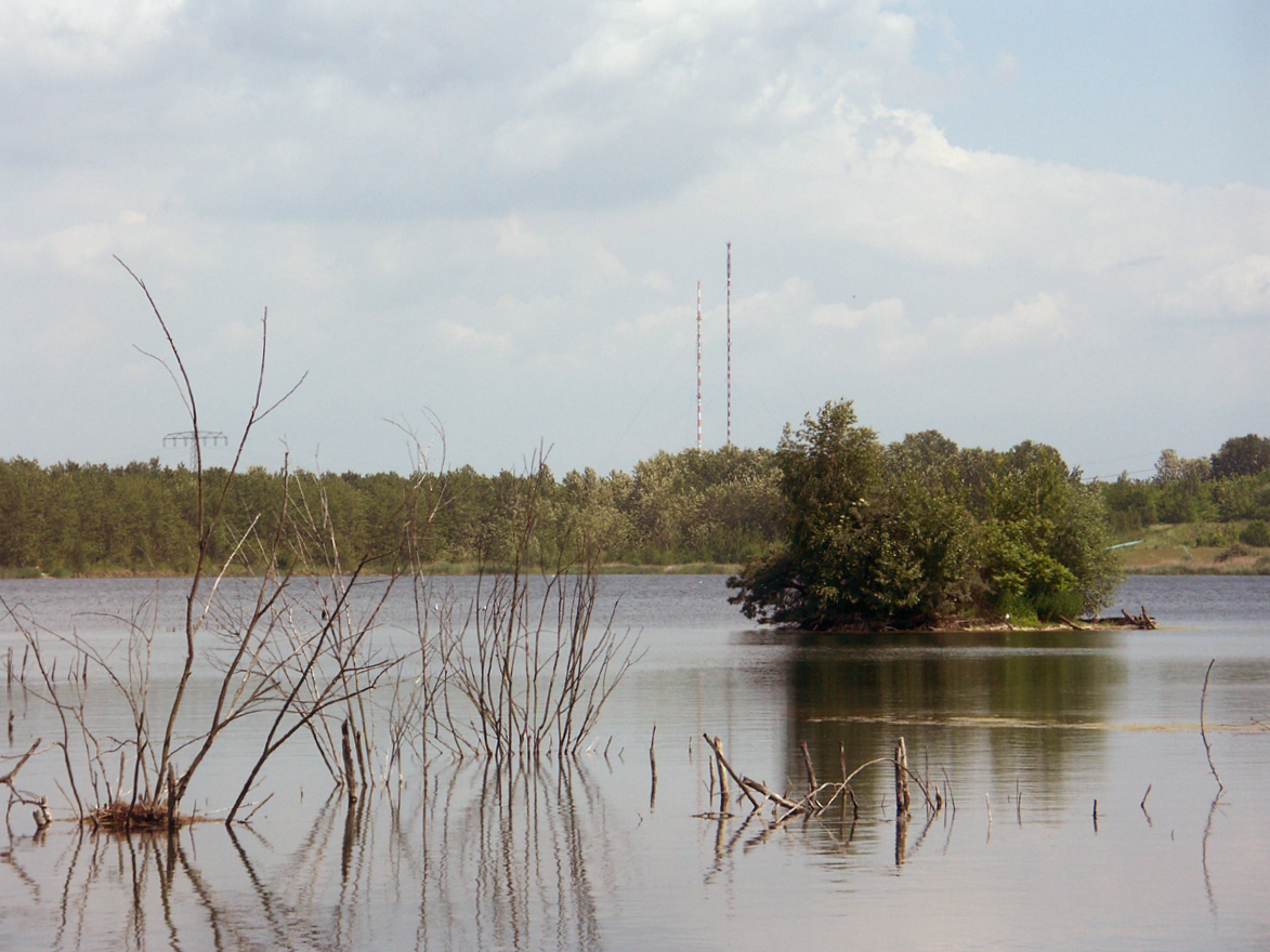 Das geflutete Tagebaurestloch Werbener See